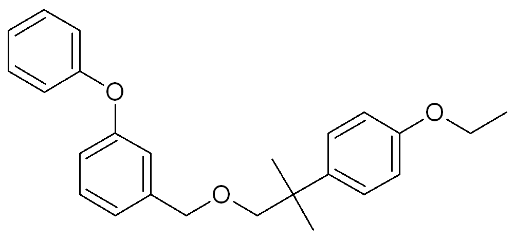 Etofenprox